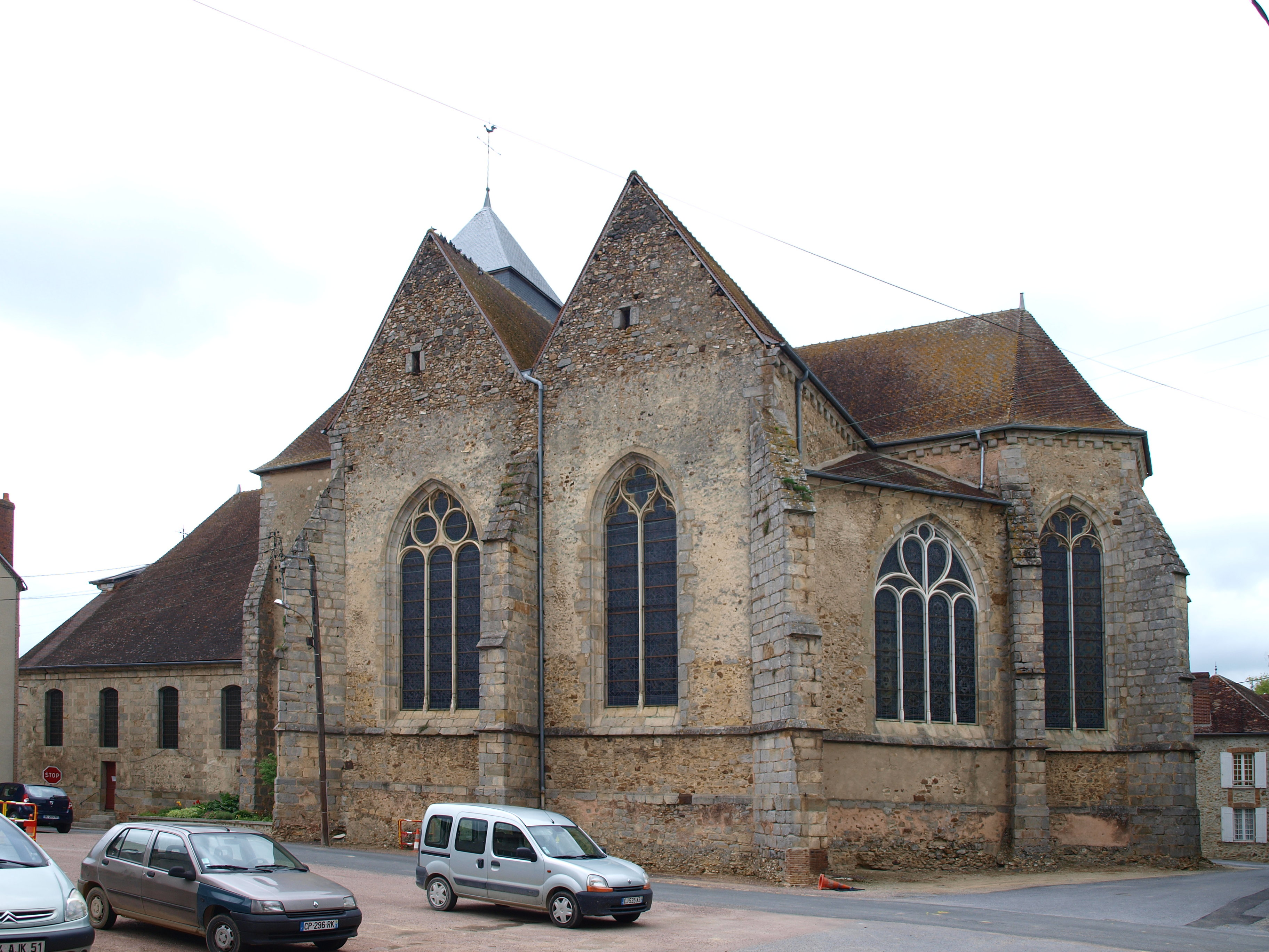 Barbonne-Fayel (Marne, France) ; l'église.